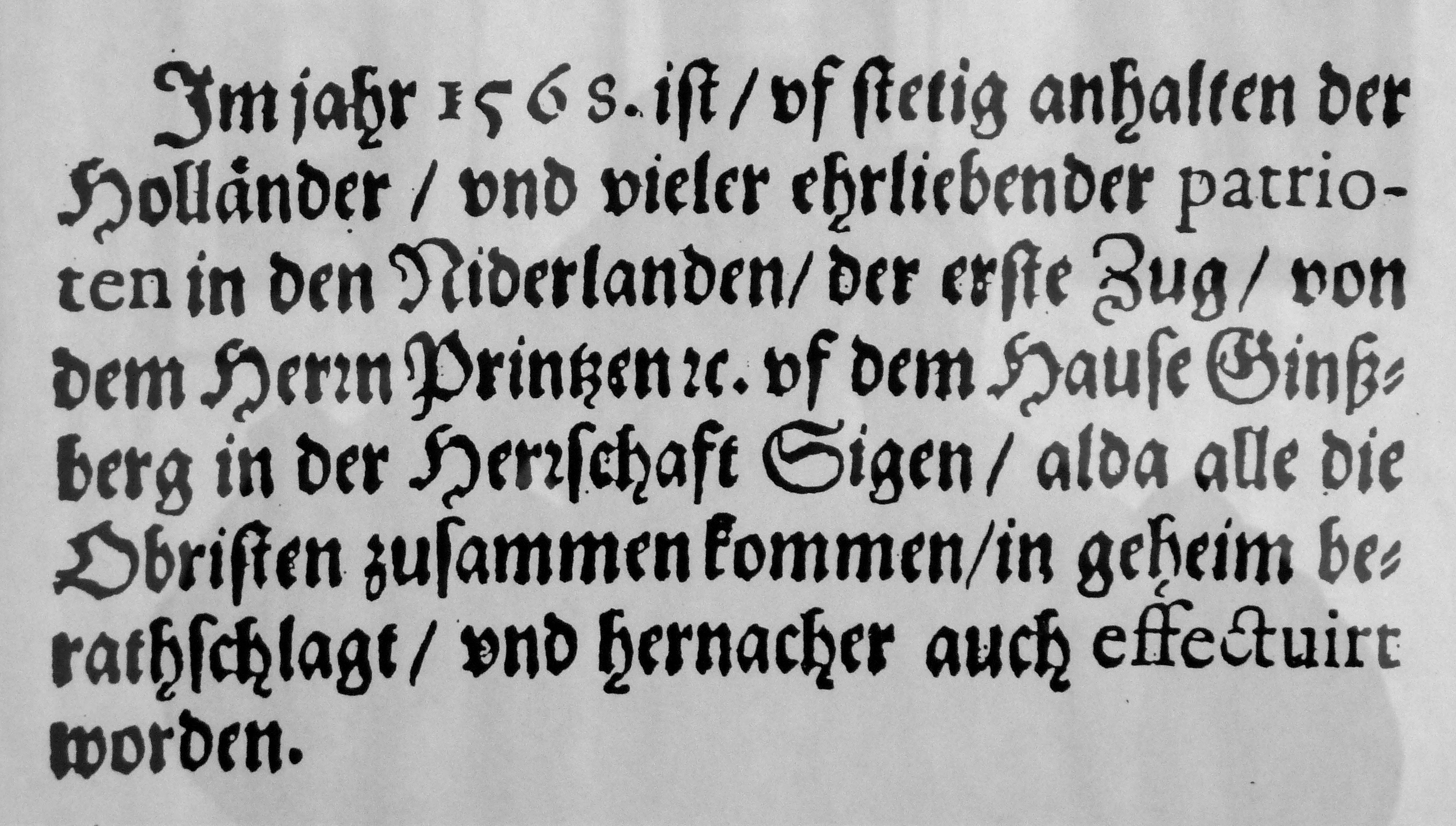 Gemeinde Grund (Hilchenbach)/Westfalen: Die Ginsburg, vom 13. bis 17. Jahrhundert Grenzfestung des Hauses Nassau auf dem Schlossberg. Historischer Kurzbericht über den Feldzug Wilhelm I. von Oranien-Nassau gegen die spanische Herrschaft über die Niederlande im Jahr 1568